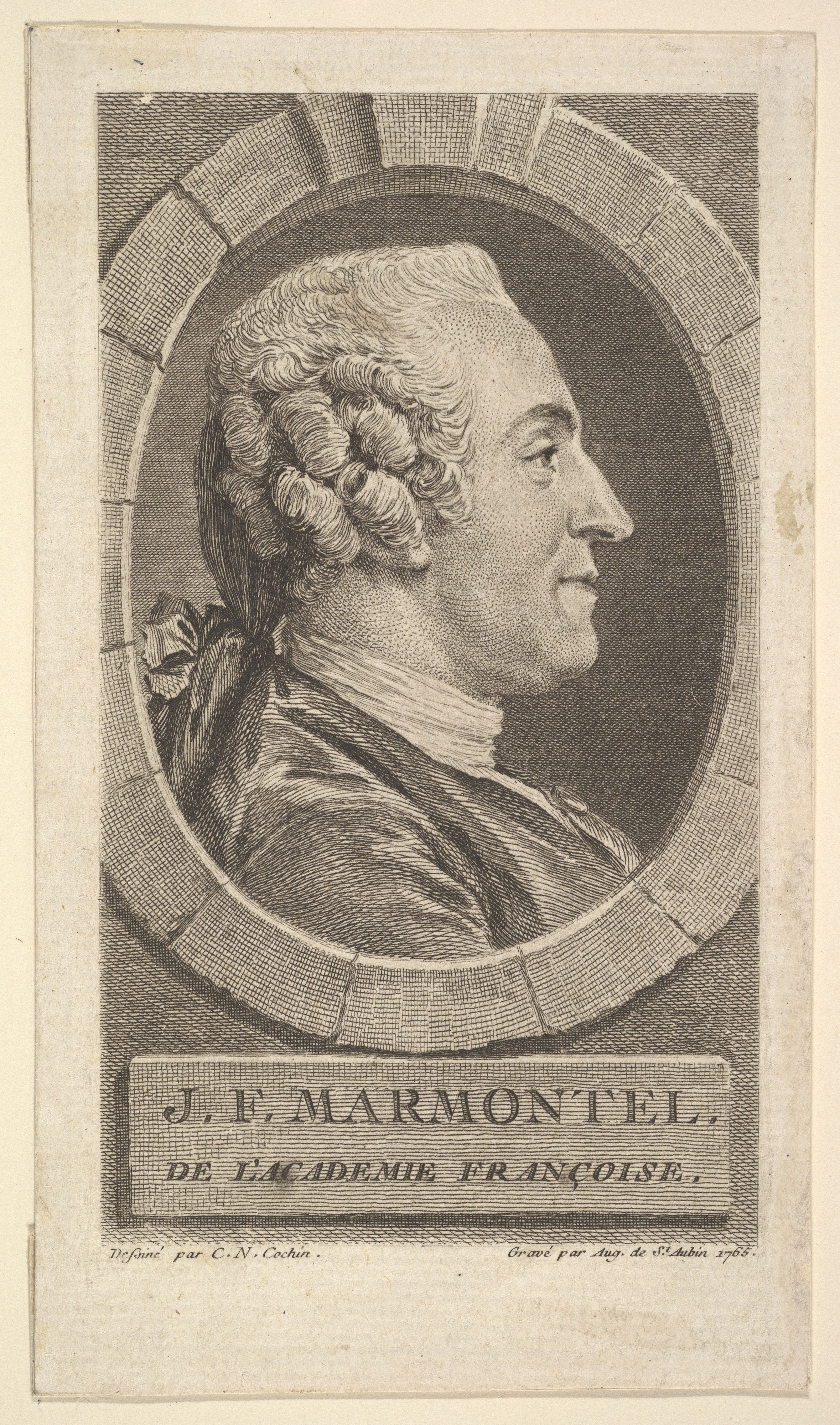 Portrait of Jean-François Marmontel